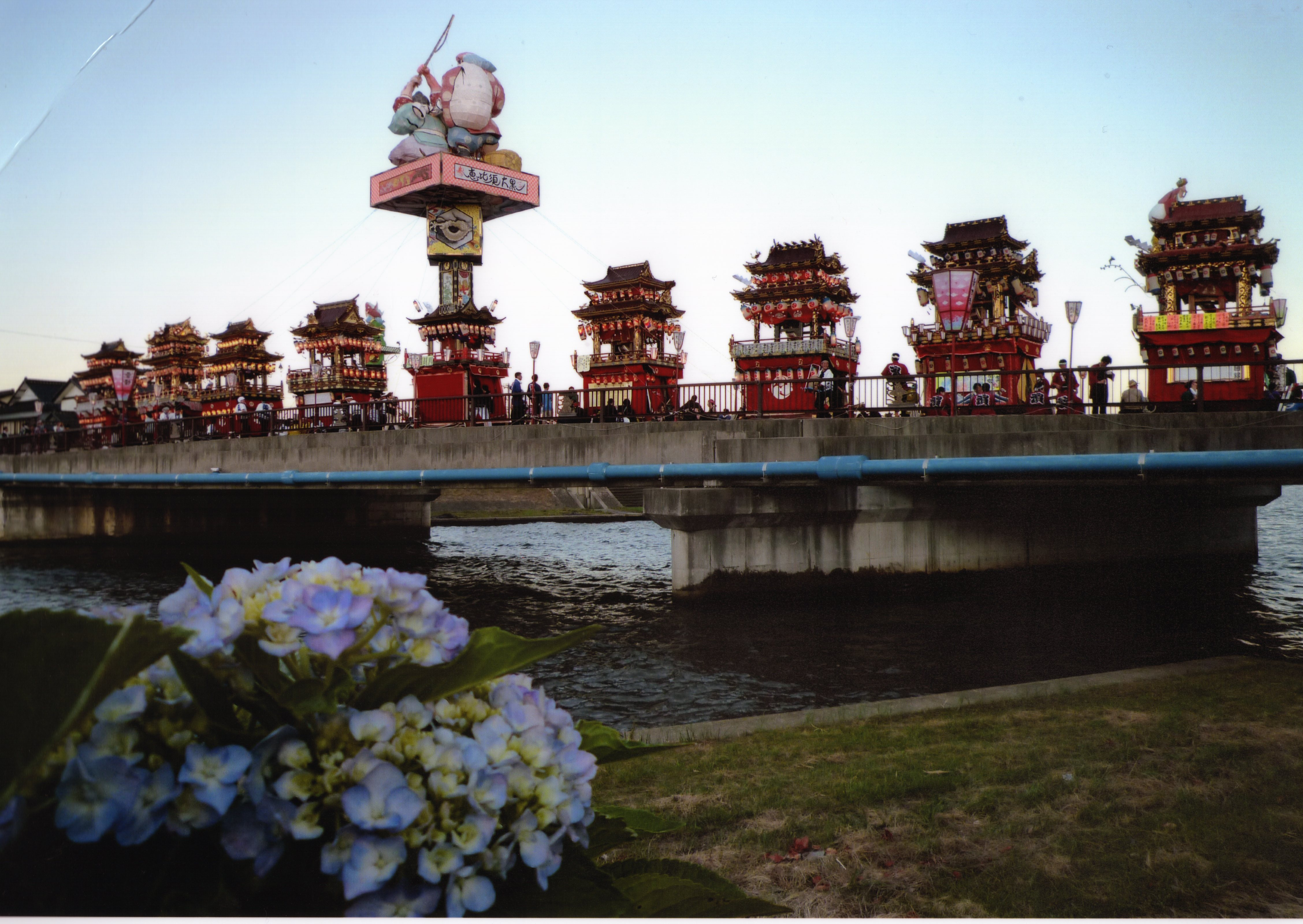 毎年7月20日と21日に開催される石川県珠洲市飯田町での祭りです。